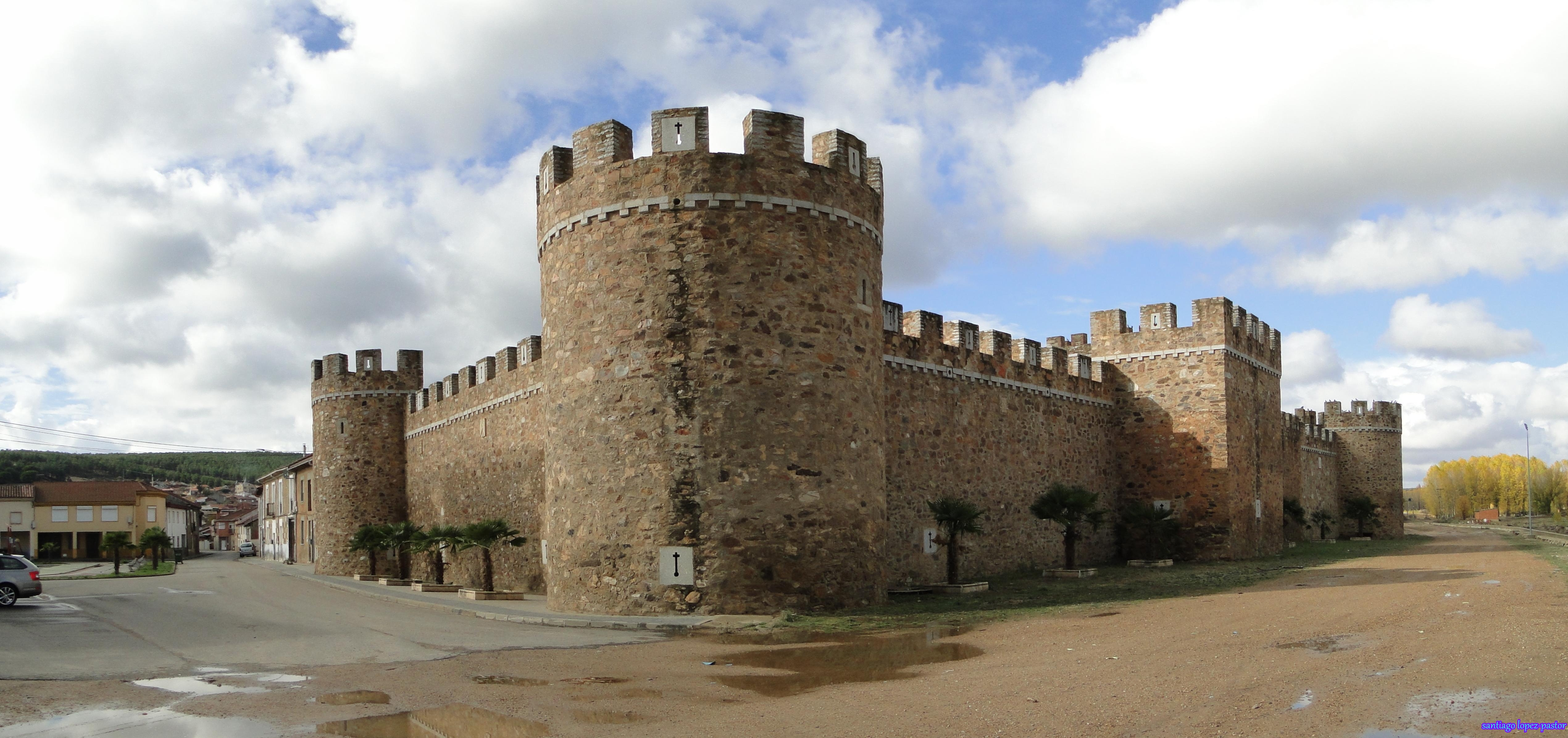 Alija del Infantado